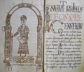 Legis salica.